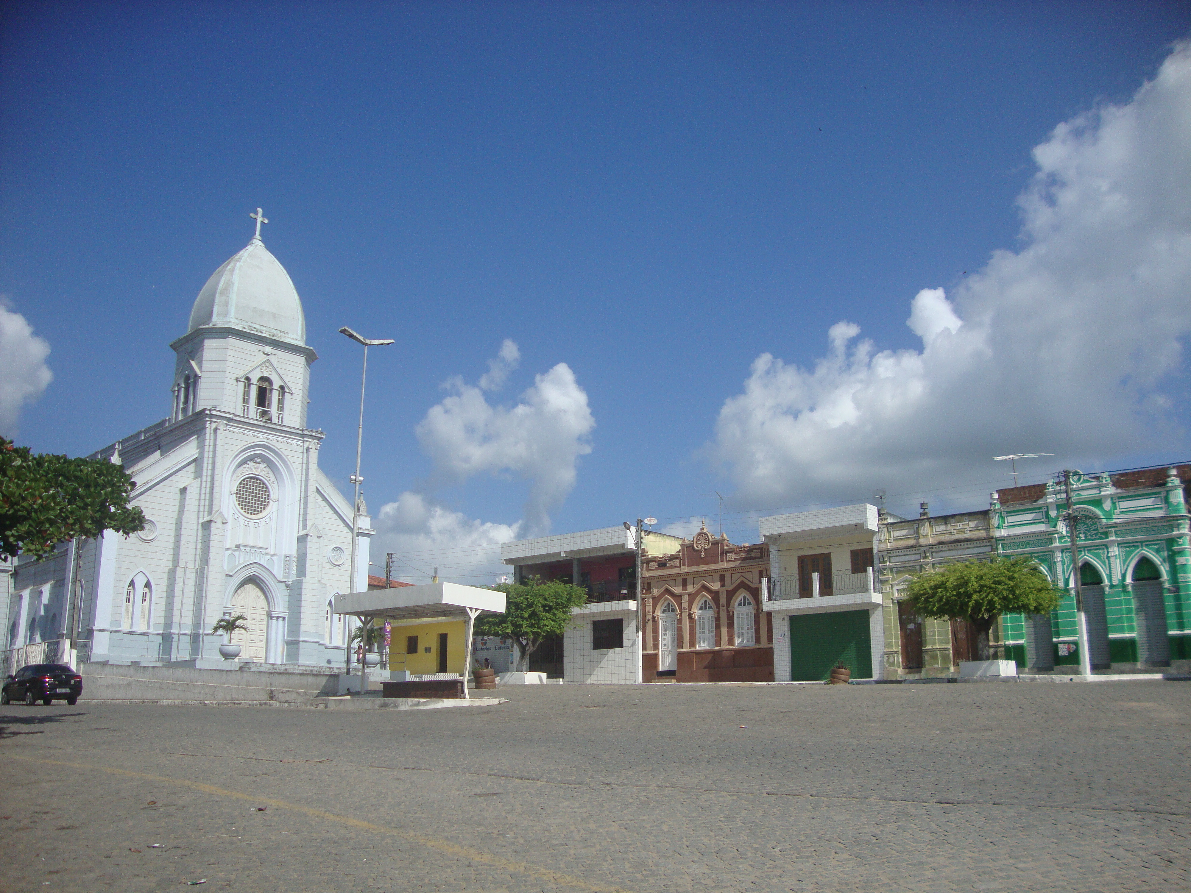 Vista do Centro da Cidade de Umbuzeiro - PB